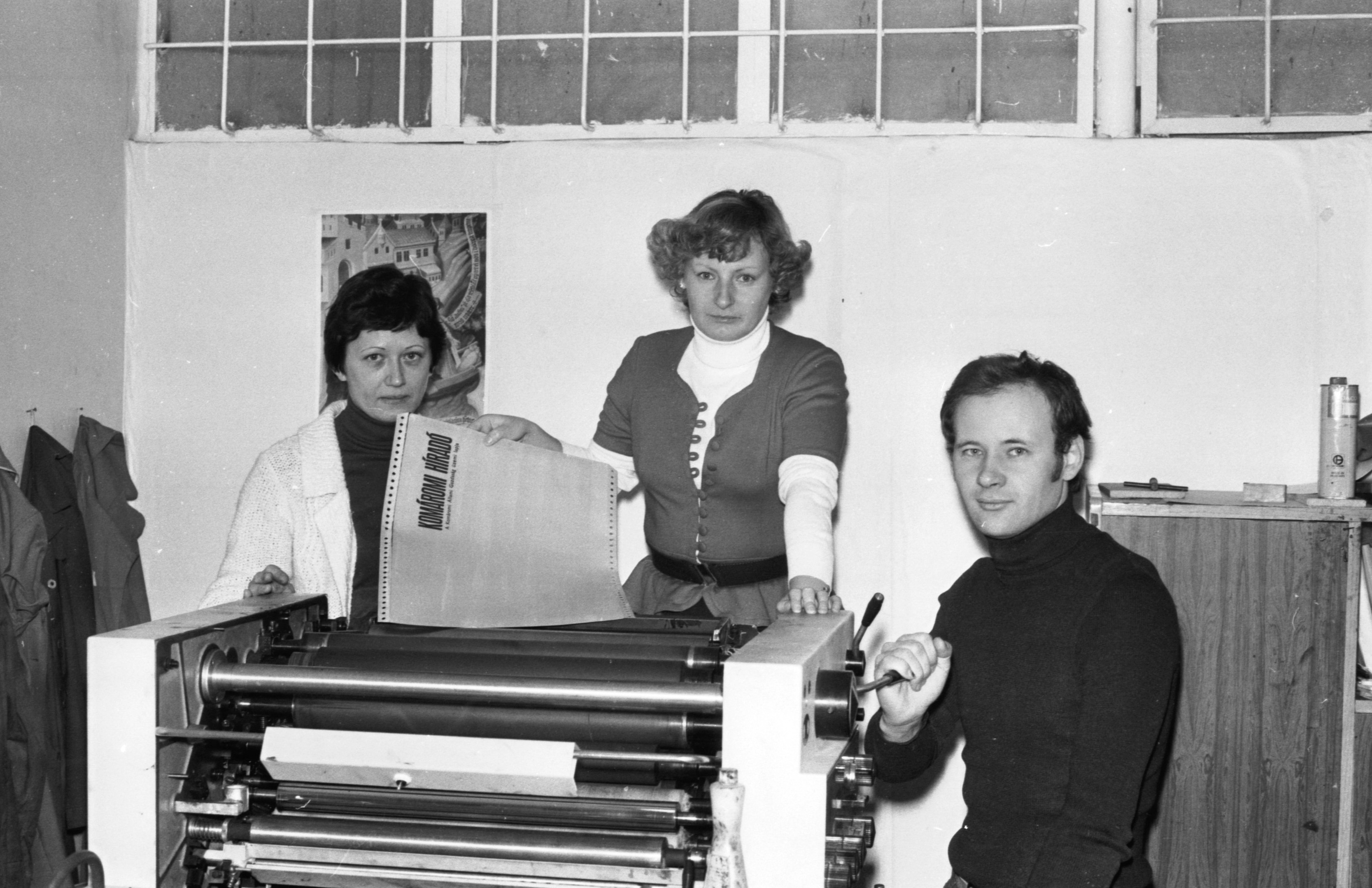 Romayor kis-ofszet nyomdagép. Location: Hungary Title: Romayor kis-ofszet nyomdagép.